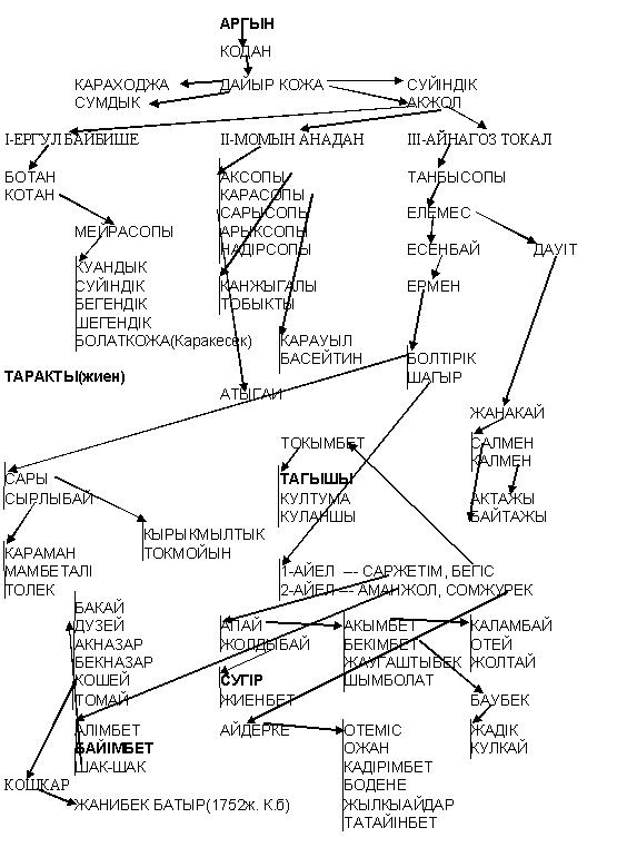 Аргын средний жуз